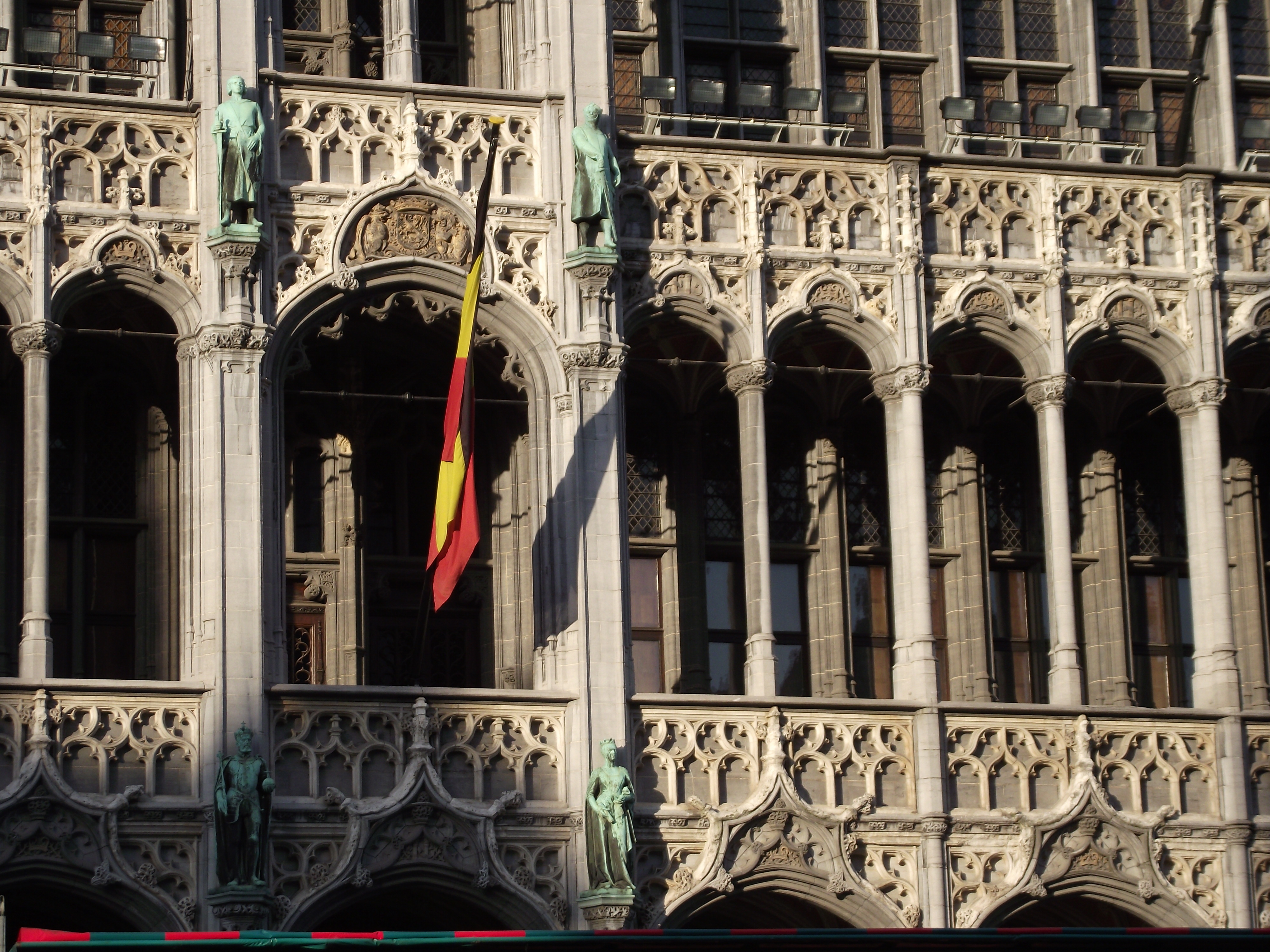 Bruxelles, Maison du Roi, Antoon II Keldermans 1515-36